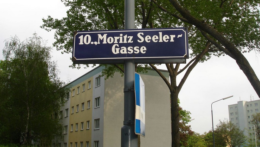 Aleja Moritza Seelera w Wiedniu (Austria)